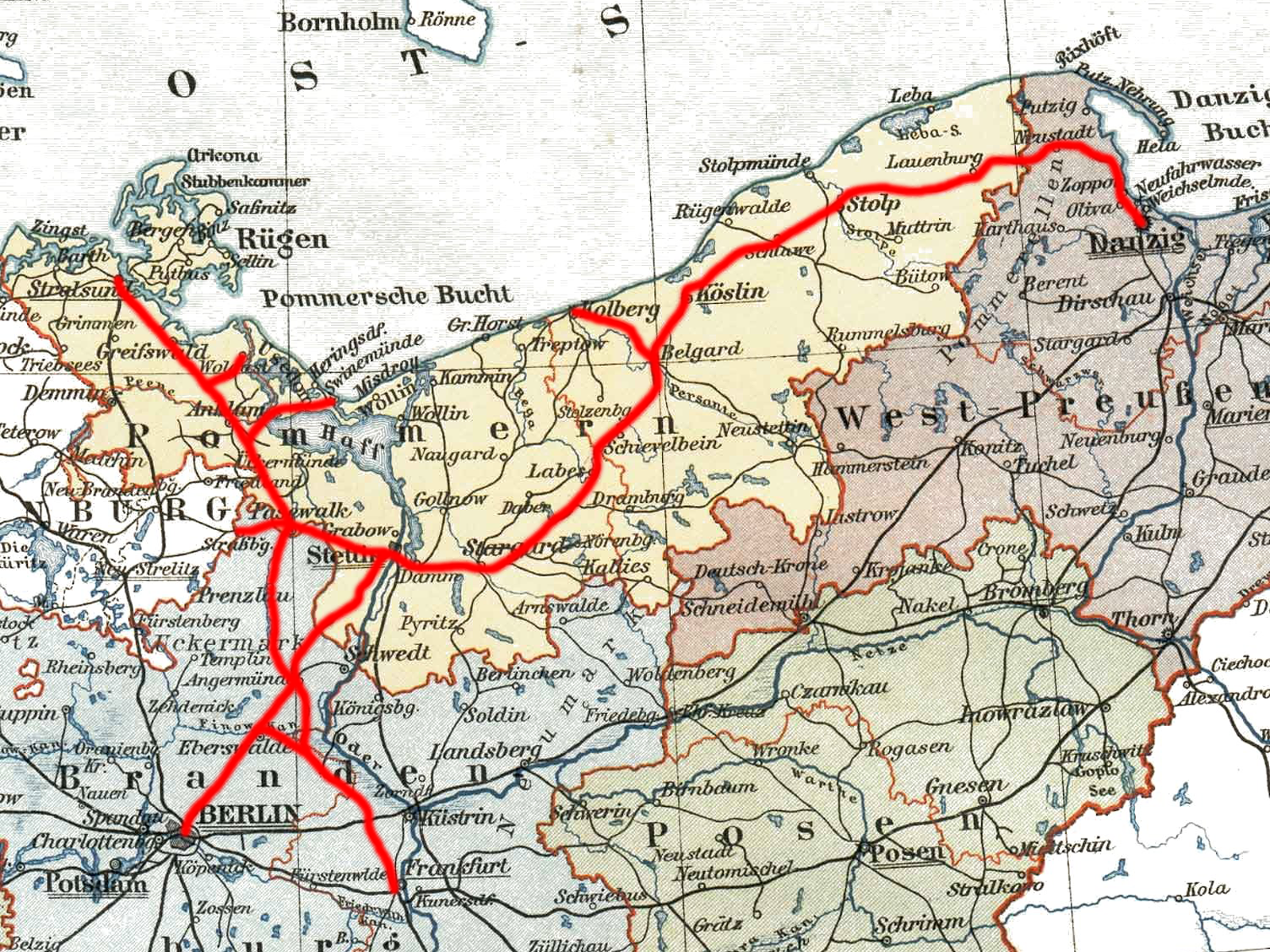 Streckennetz der Berlin-Stettiner Eisenbahn-Gesellschaft um 1879, basierend auf Image:Prussia (political map before 1905).jpg